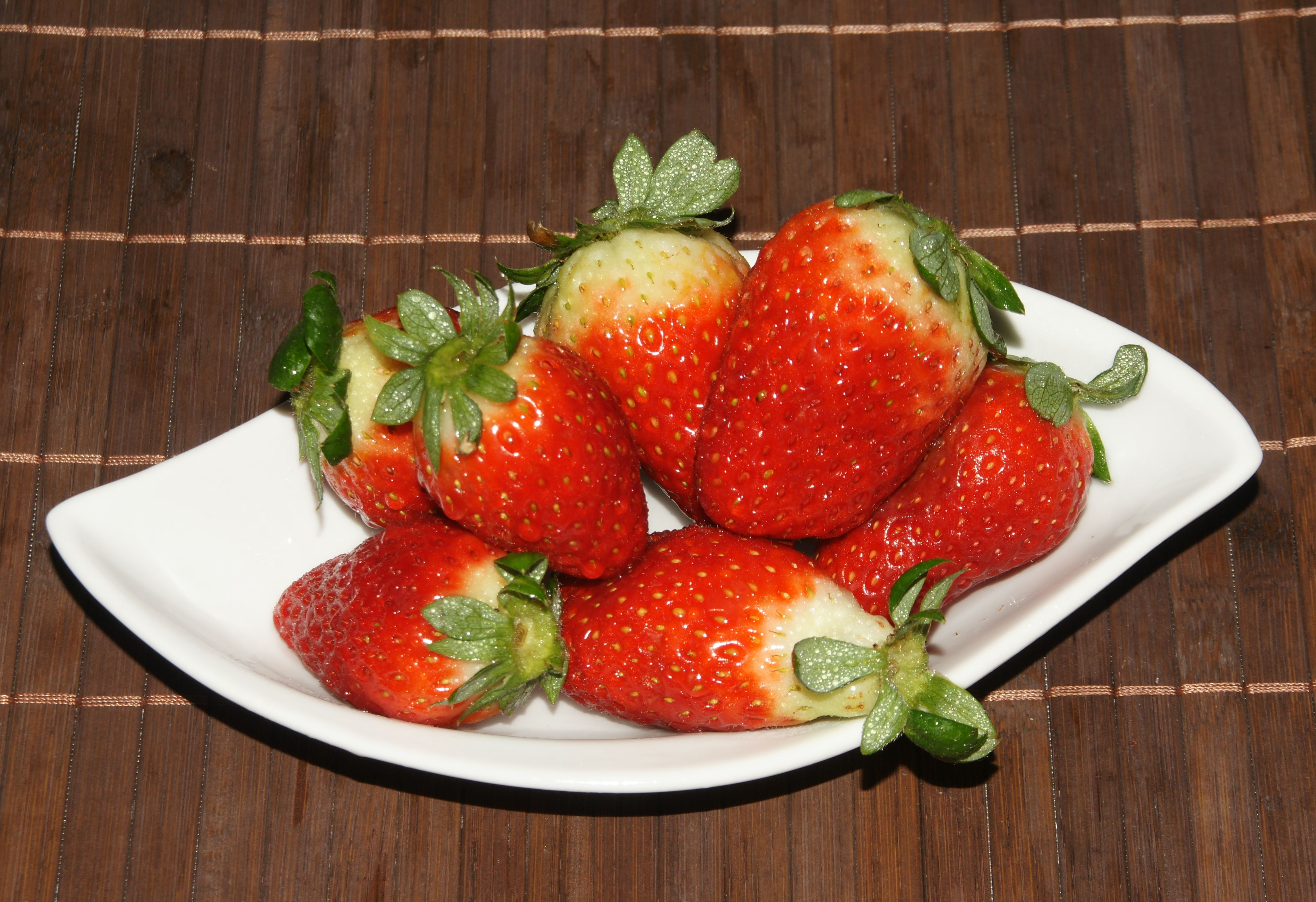 Schale mit Erdbeeren